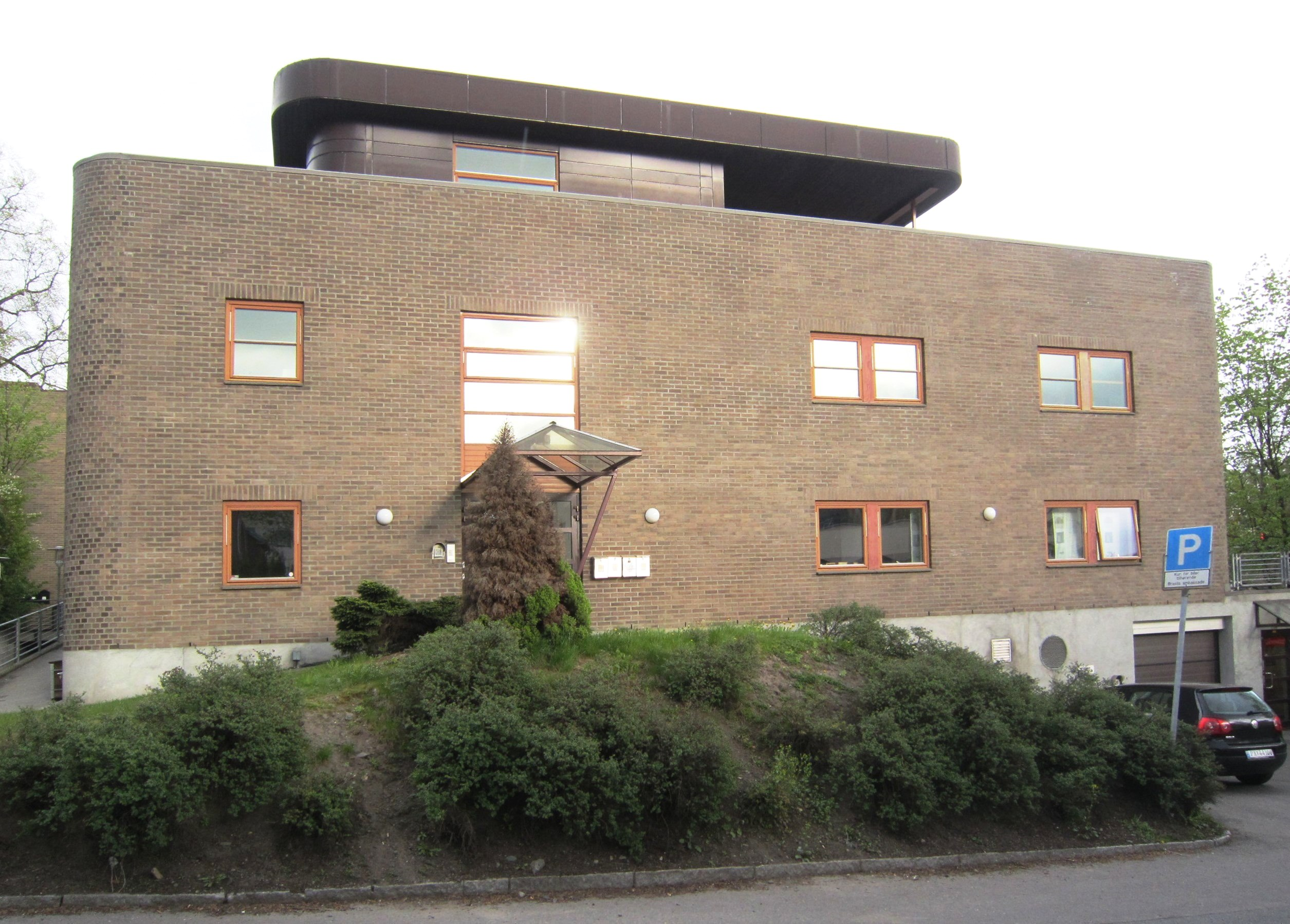 Sigurd Syrs gate 2-4 med Brasils ambassade